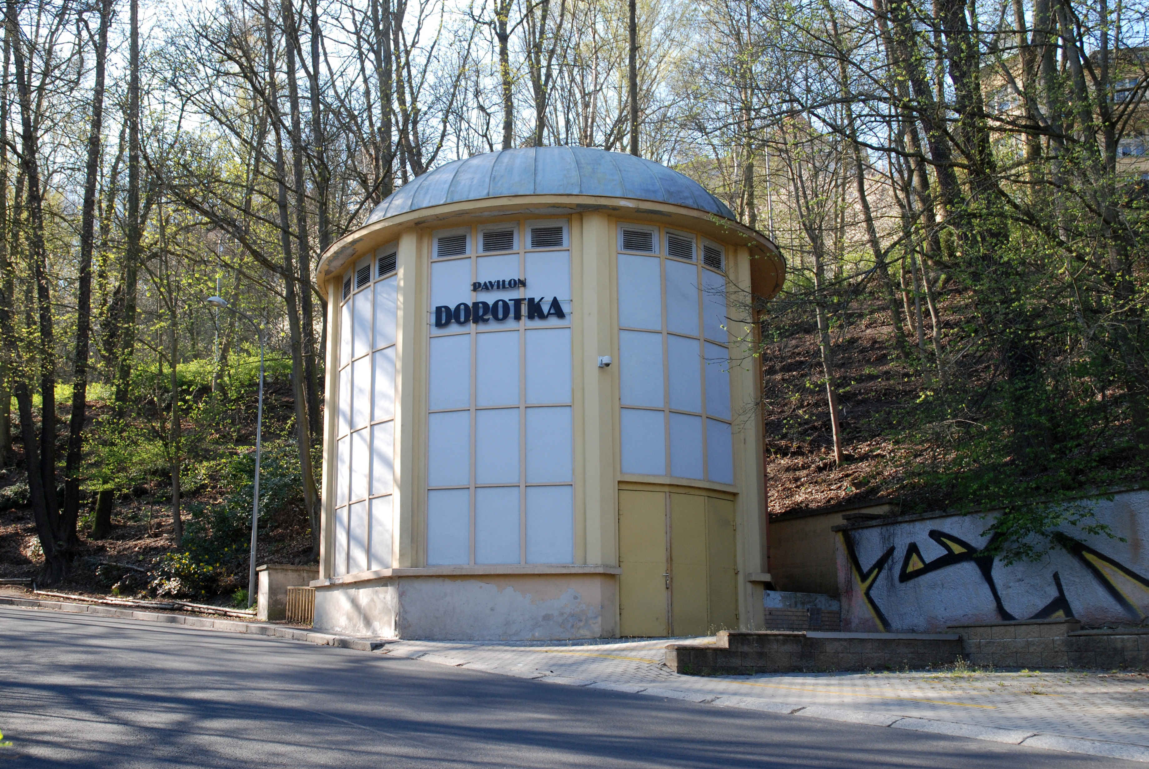 Pavilon pramenu Dorotka v ulici U Imperiálu, Karlovy Vary